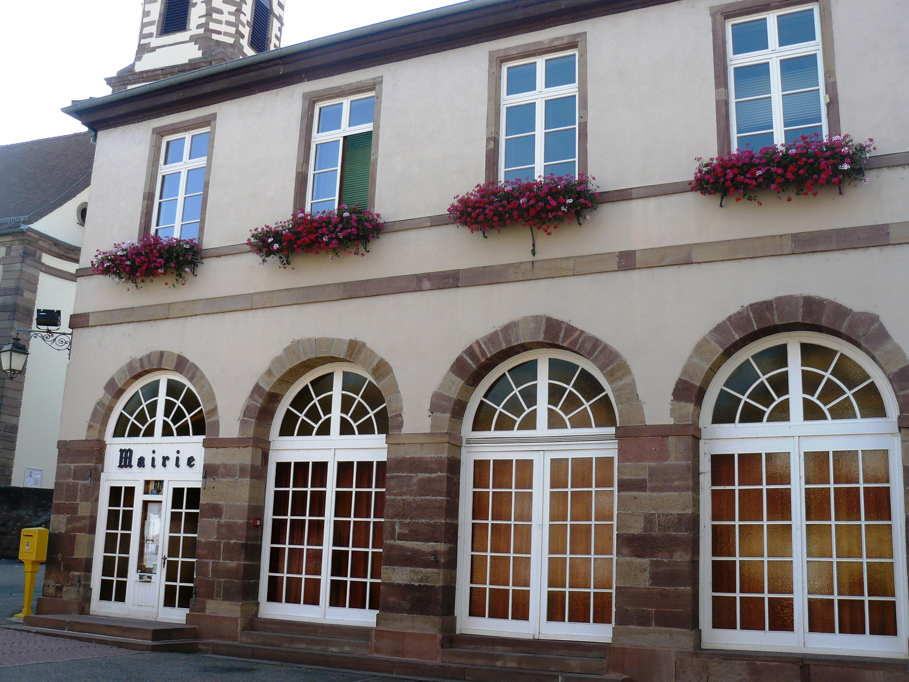 La mairie de Stotzheim